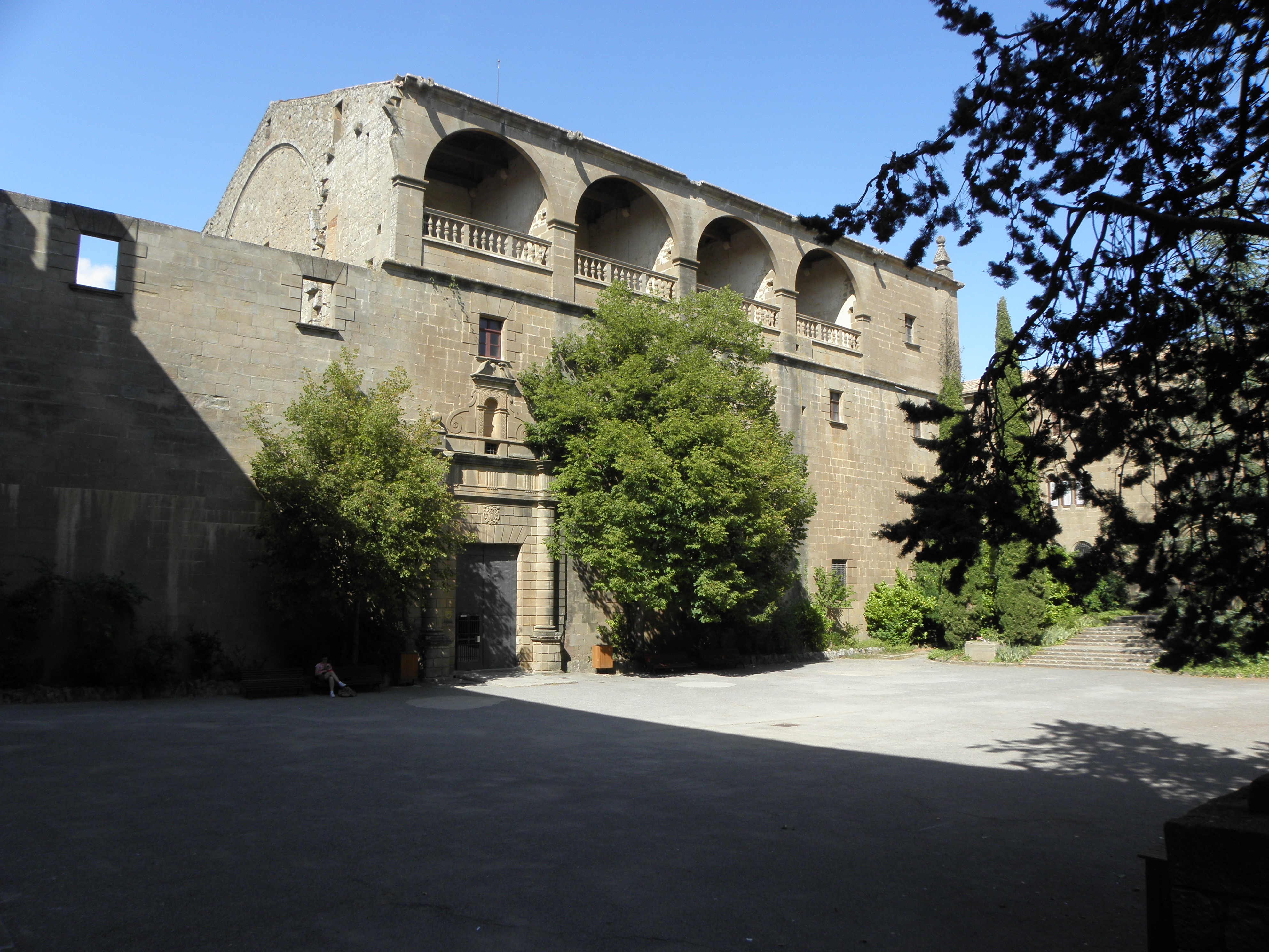 La plaça del Miracle (Riner, Solsonès). El costat nord de la plaça, tancat per l'església.